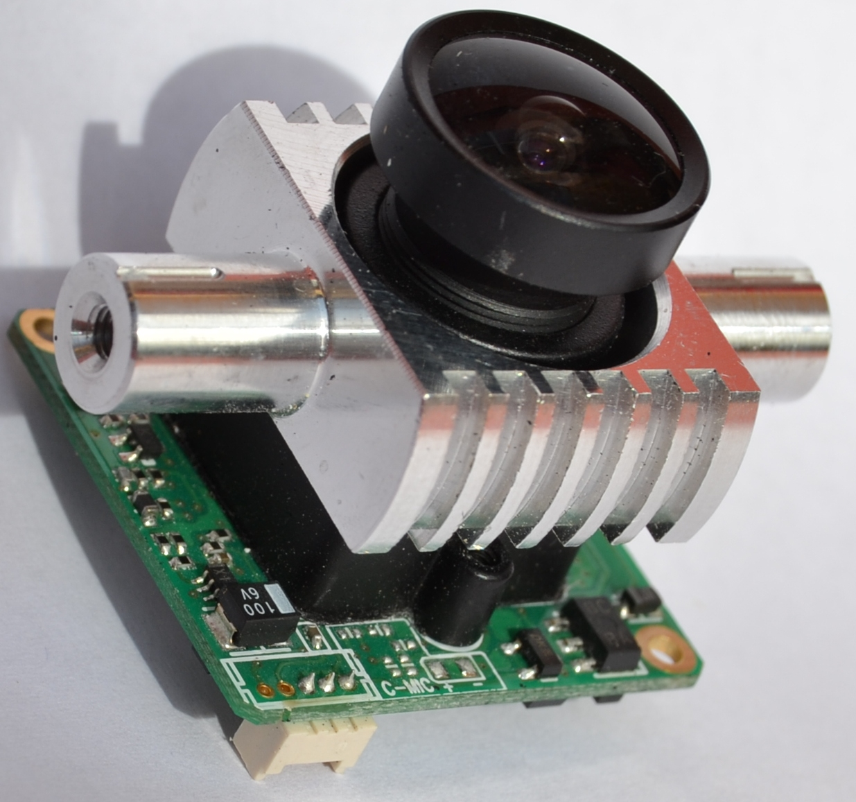 Optischer Sensor für Pattern- und Shape Recognition